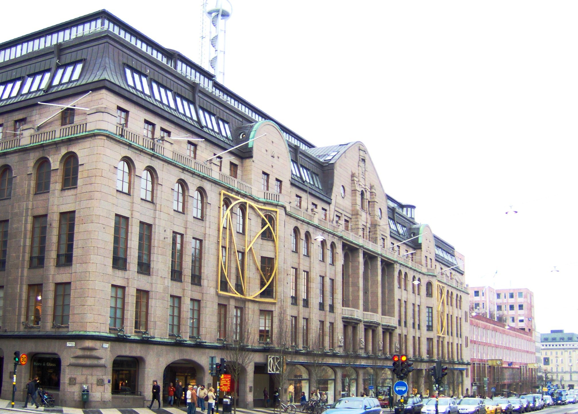 NK, Nordiska kompaniet på Hamngatan i Stockholm granne med PK-huset. NK, Nordic Company on Harbourstreet in Stockholm,Sweden, neigbourg to PK-house. May 2006.